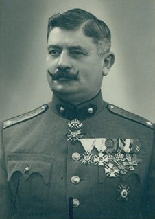 Снимка на генерал Георги Михайлов, началник на Шуменския гарнизон, 8 юли 1936 г.